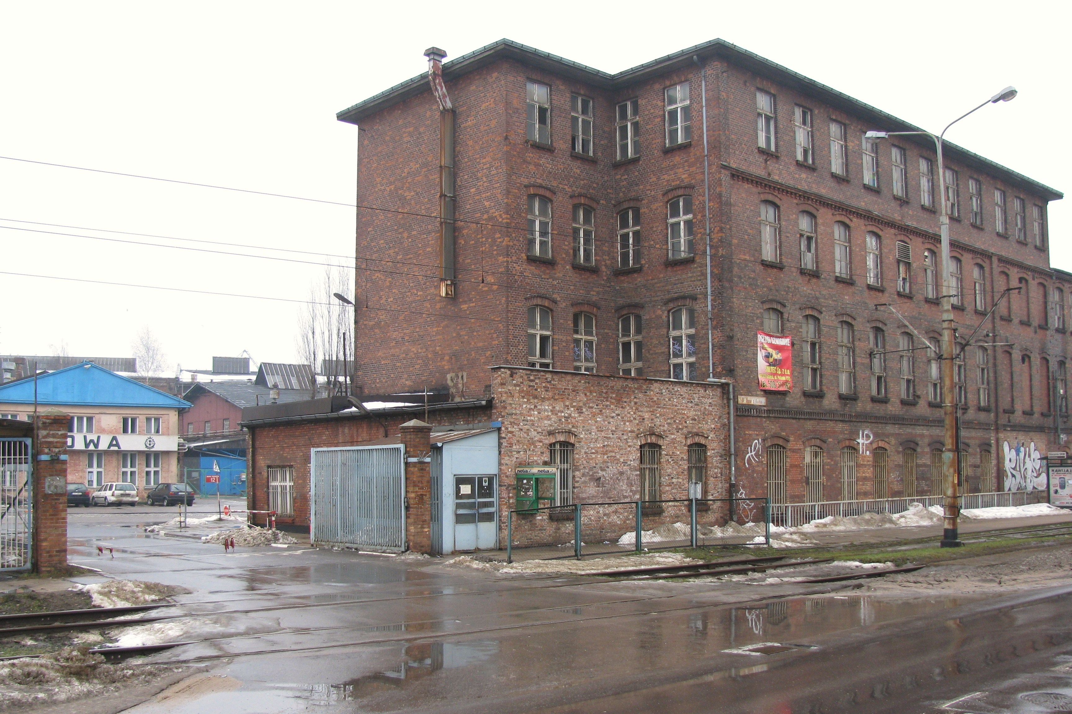 Stocznia Gdańska - III brama, dawna brama Stoczni Schichaua, ul. Jana z Kolna w Gdańsku. Budynek po prawej tzw. "wzorcownia".